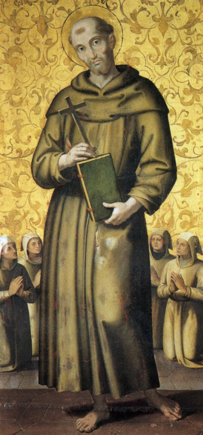 Pietro Perugino: San Francesco e i quattro disciplinati. Cat. no. A6 in Vittoria Garibaldi: Perugino. Catalogo completo. Octavo, Firenze 2000, ISBN 88-8030-091-1